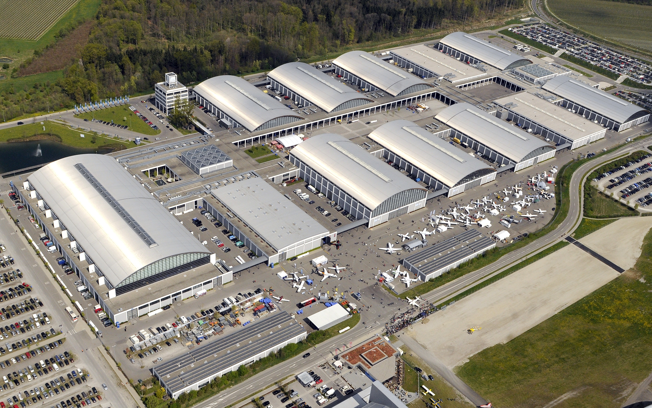 Messe Friedrichshafen während der AERO. Originalbeschreibung des DLR: Im Rahmen der internationalen Flugmesse AERO 2011 in Friedrichshafen zeigte das DLR-Institut für Technische Thermodynamik das weltweit erste pilotengesteuerte, mit Brennstoffzellen startfähige Flugzeug - den Motorsegler ANTARES DLR-H2.